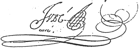 Signature de Jacques Jubé (1674-1746)